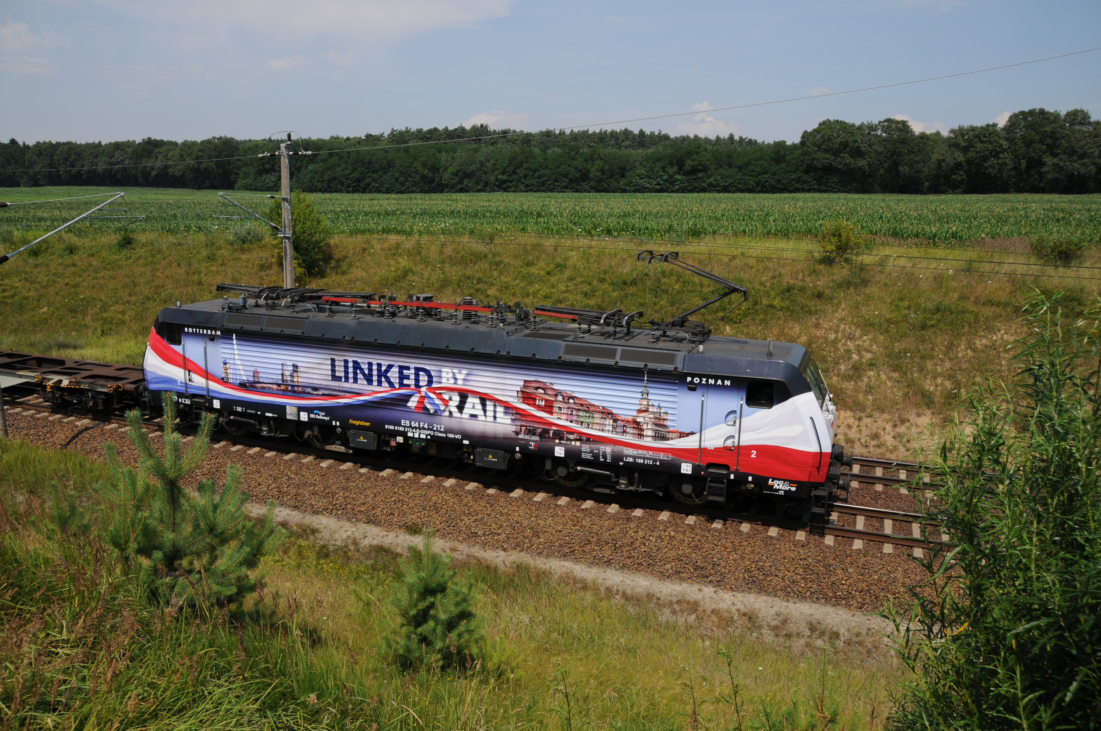 189-212 en 189-213